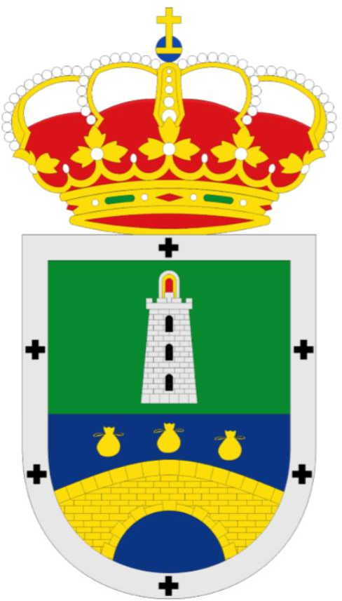 El 4 de abril de 2019 el Consejo de Gobierno de Cantabria decidía aprobar los símbolos de la localidad de Sámano, en el municipio de Castro-Urdiales, que reflejan conforme a las normas de la heráldica, los hechos más relevantes y peculiares de su pasado histórico.